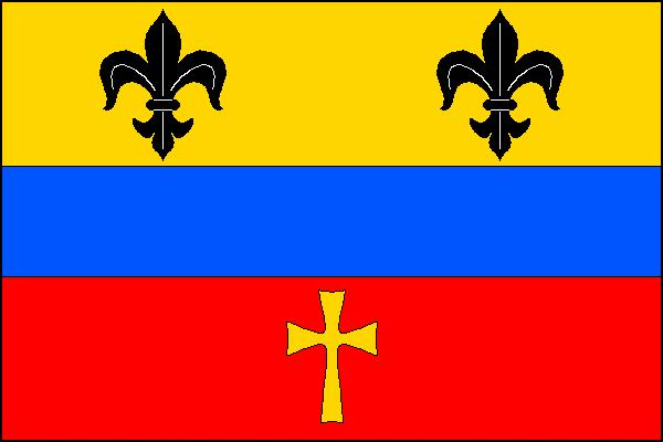 Vlajka obce Lužany (okres Jičín)